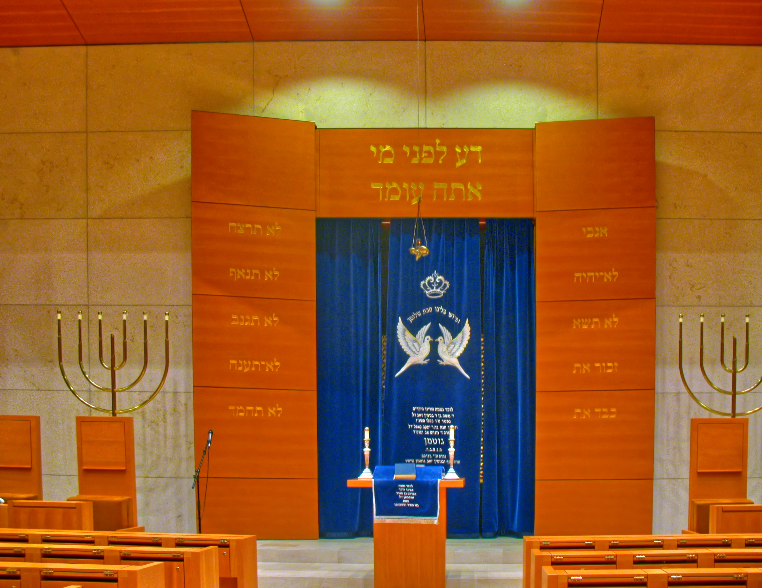 Deutschland, Bayern, München, Jüdisches Zentrum, Hauptsynagoge, Toraschrein